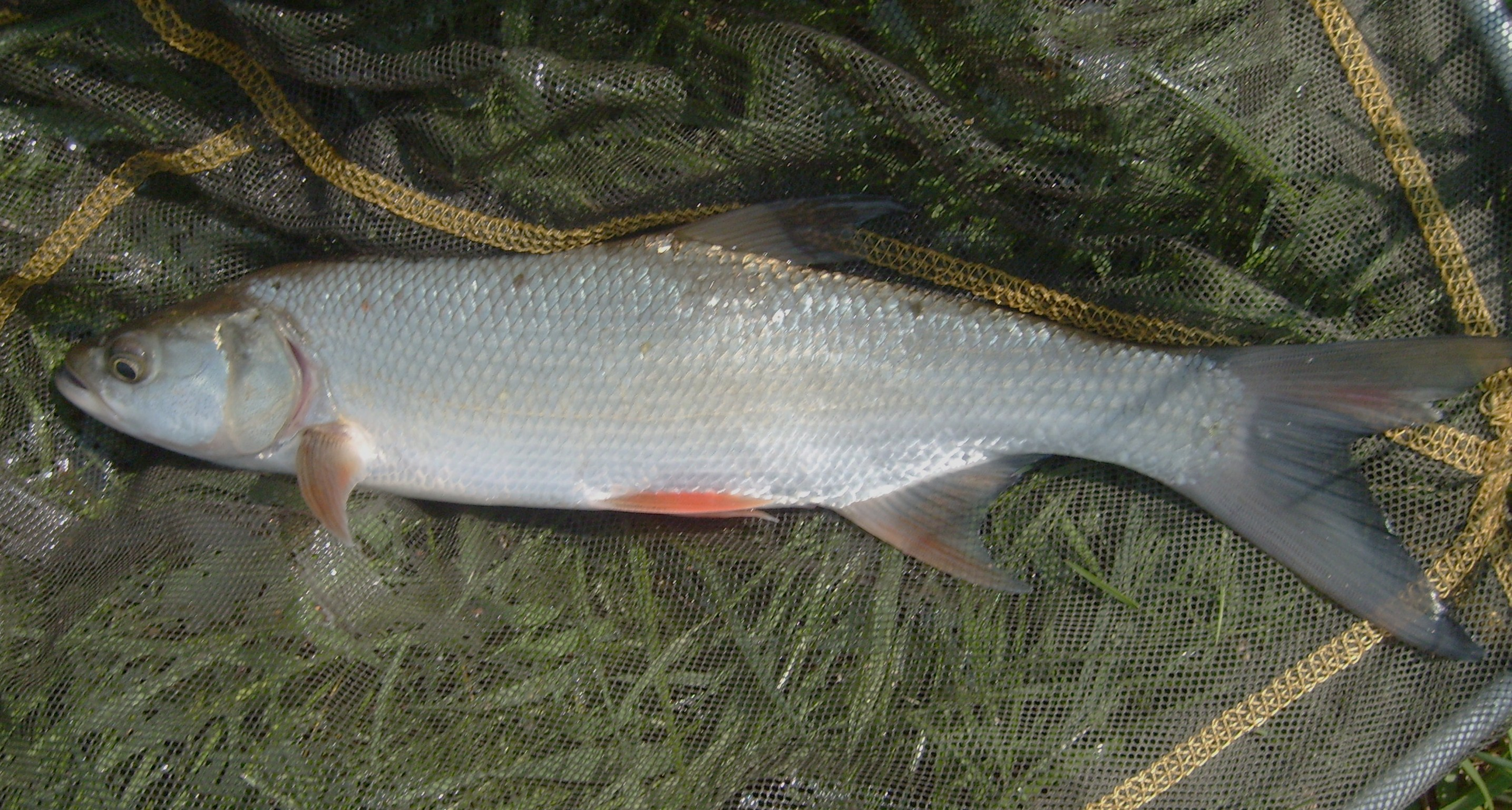 Bolen dravý (Aspius aspius)